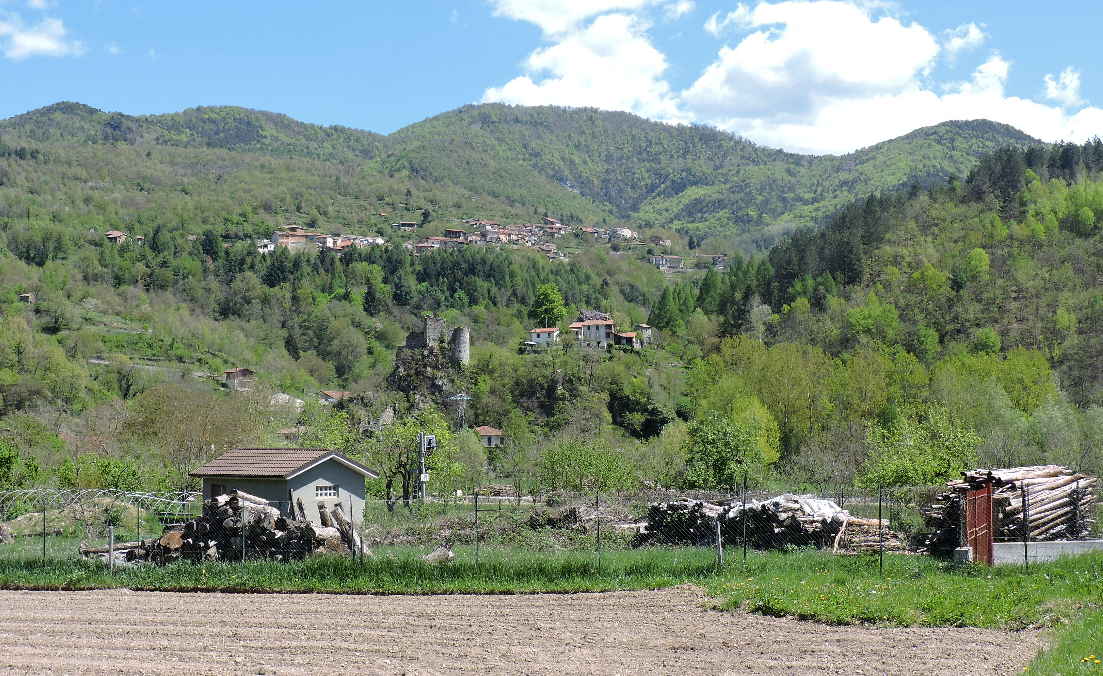 Monte Sotta (Prealpi liguri) e la frazione Casario (Priola, CN)